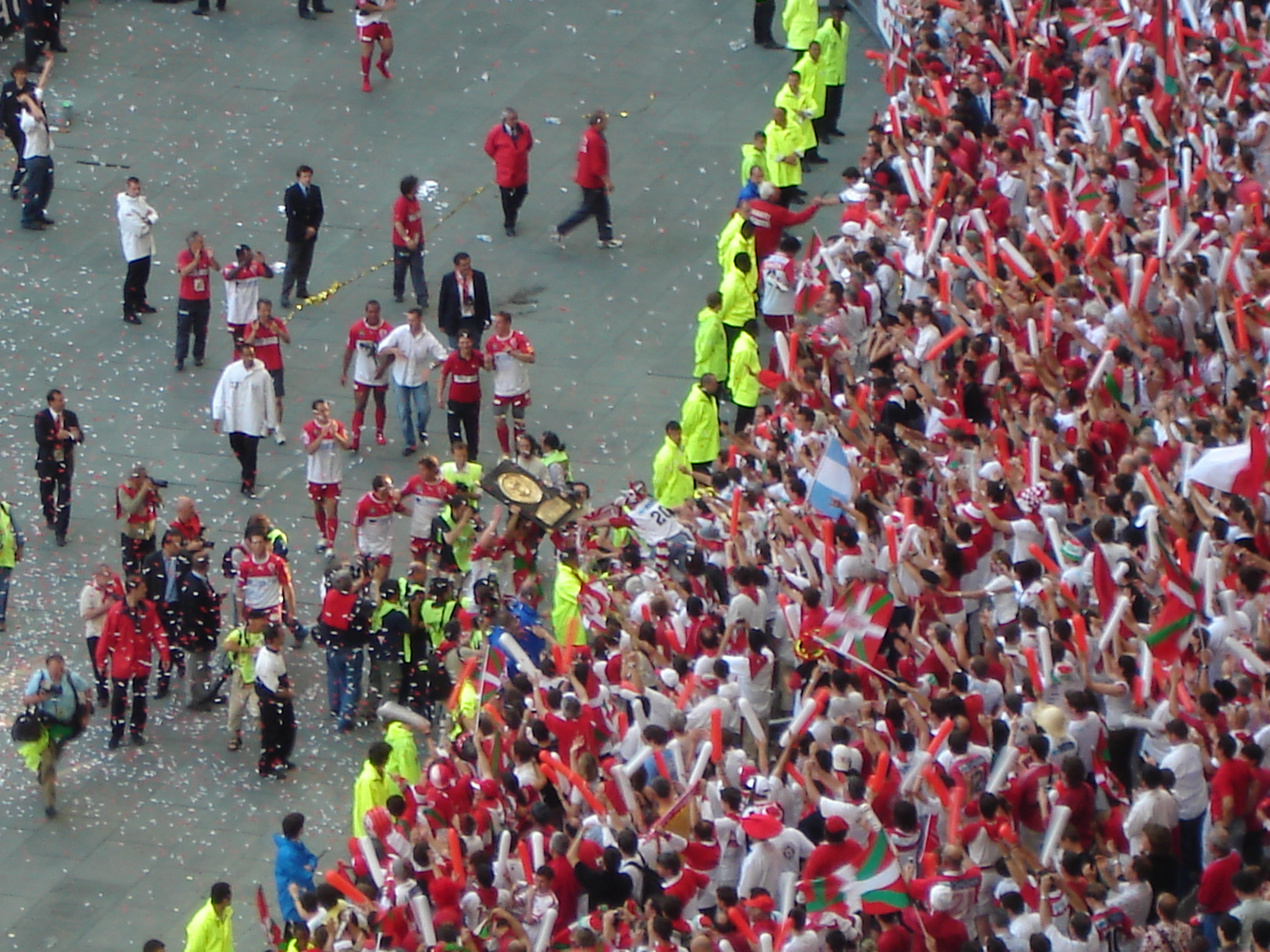 Stade de France (Saint-Denis, Seine-Saint-Denis, France) - Biarritz est champion de France 2006.